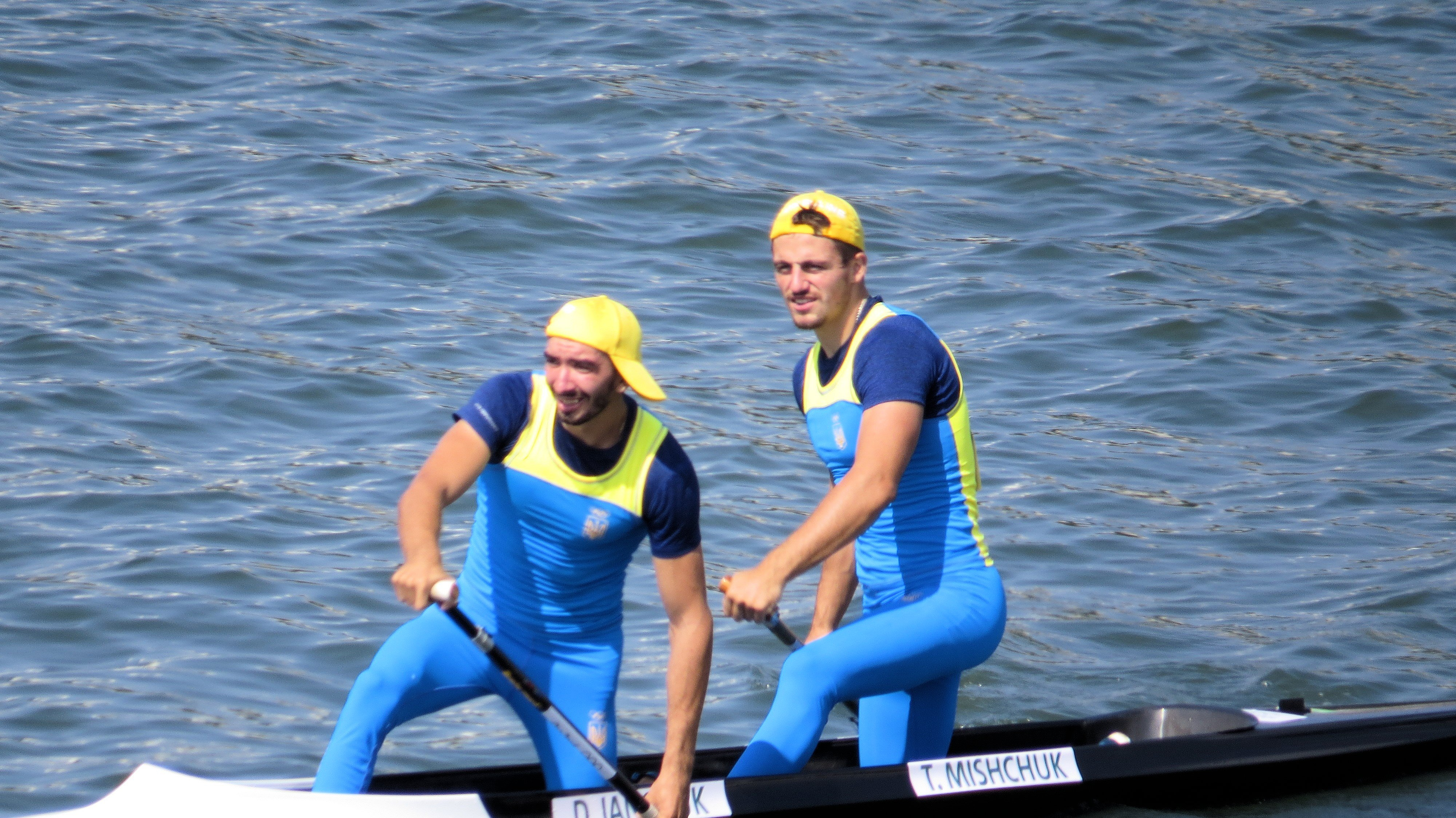 Sx50